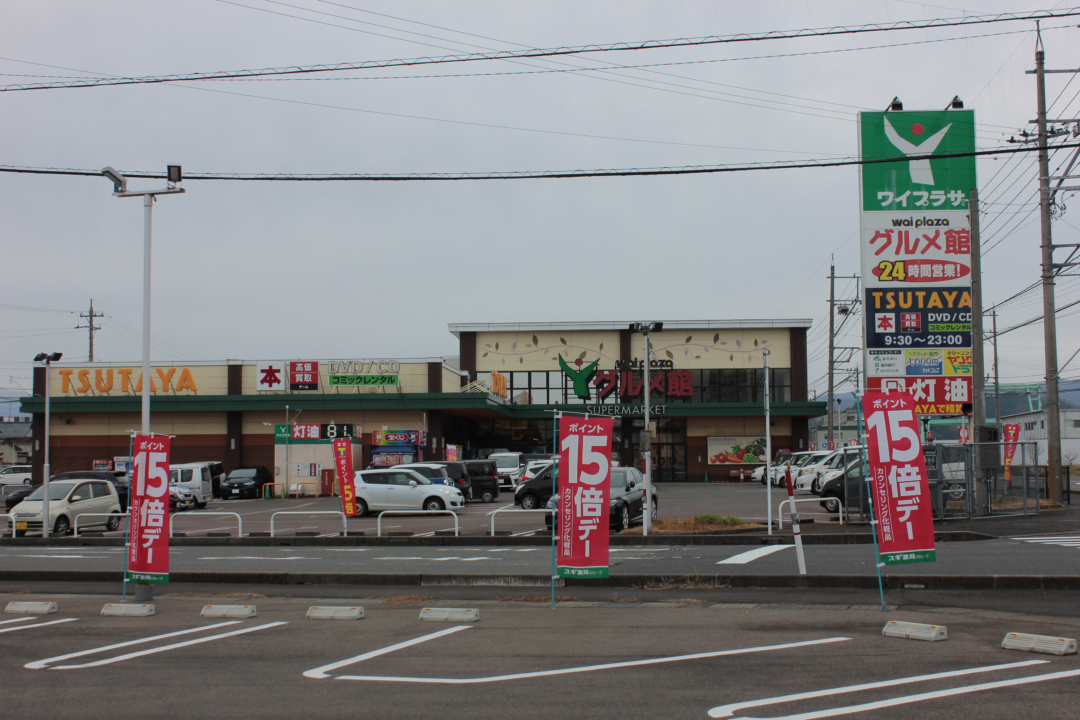 ヤスサキグルメ館武生南店（福井県越前市） Canon EOS Kiss X5